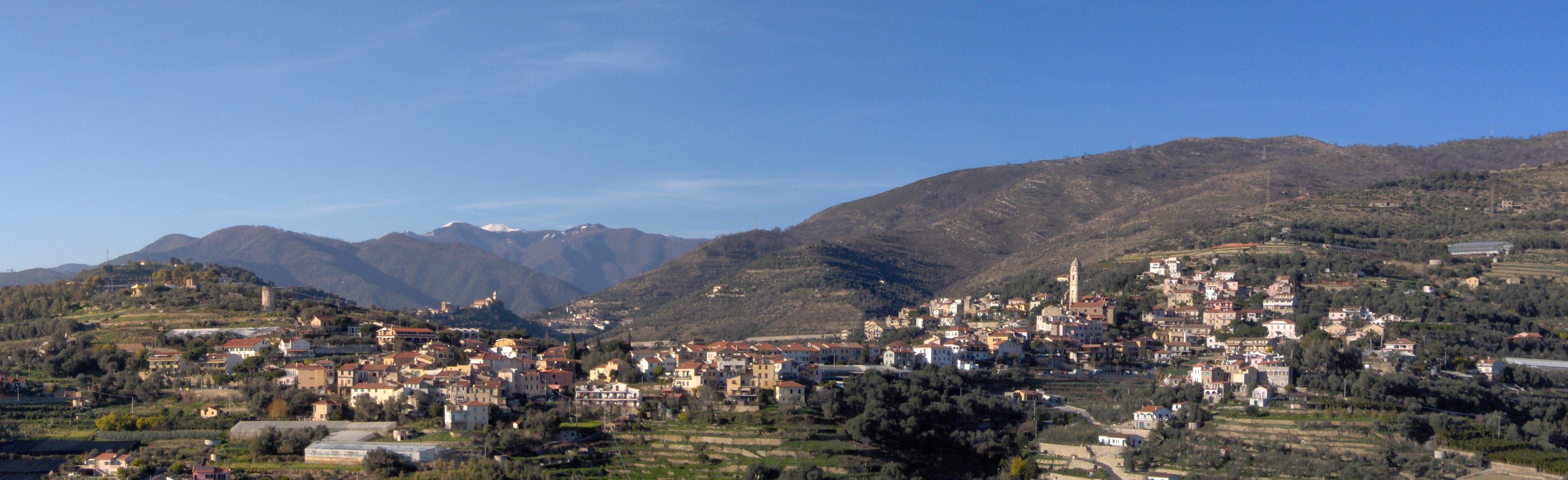 Panorama di Pompeiana dalla regione Sanstevi (Santo Stefano al Mare)